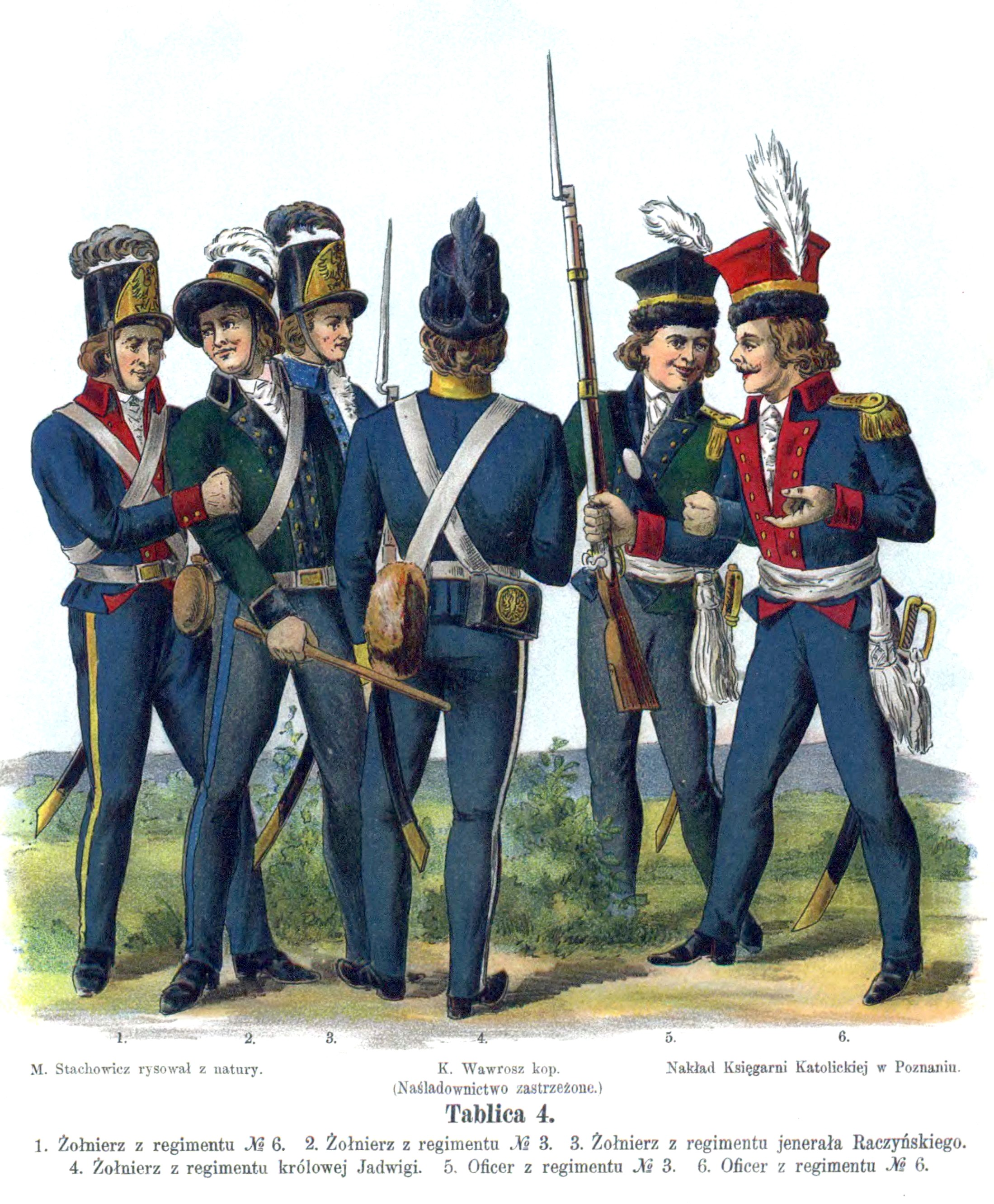 Kościuszko Uprising army